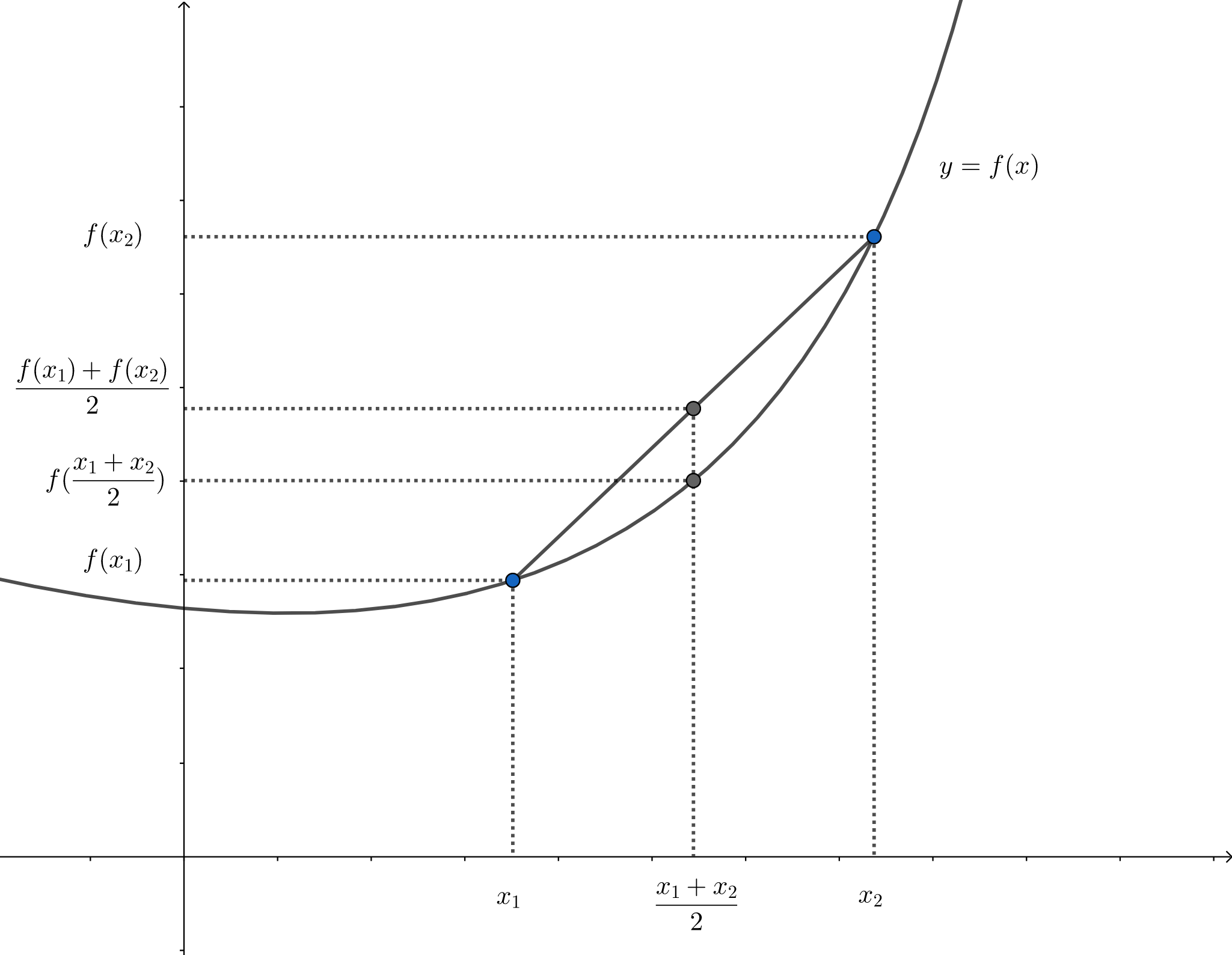 凸函数定义的图像表示